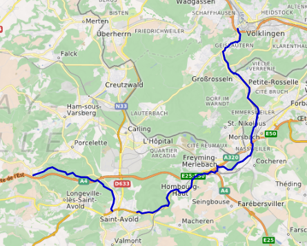 carte réalisée sur umap This map may be incomplete, and may contain errors. Don't rely solely on it for navigation.